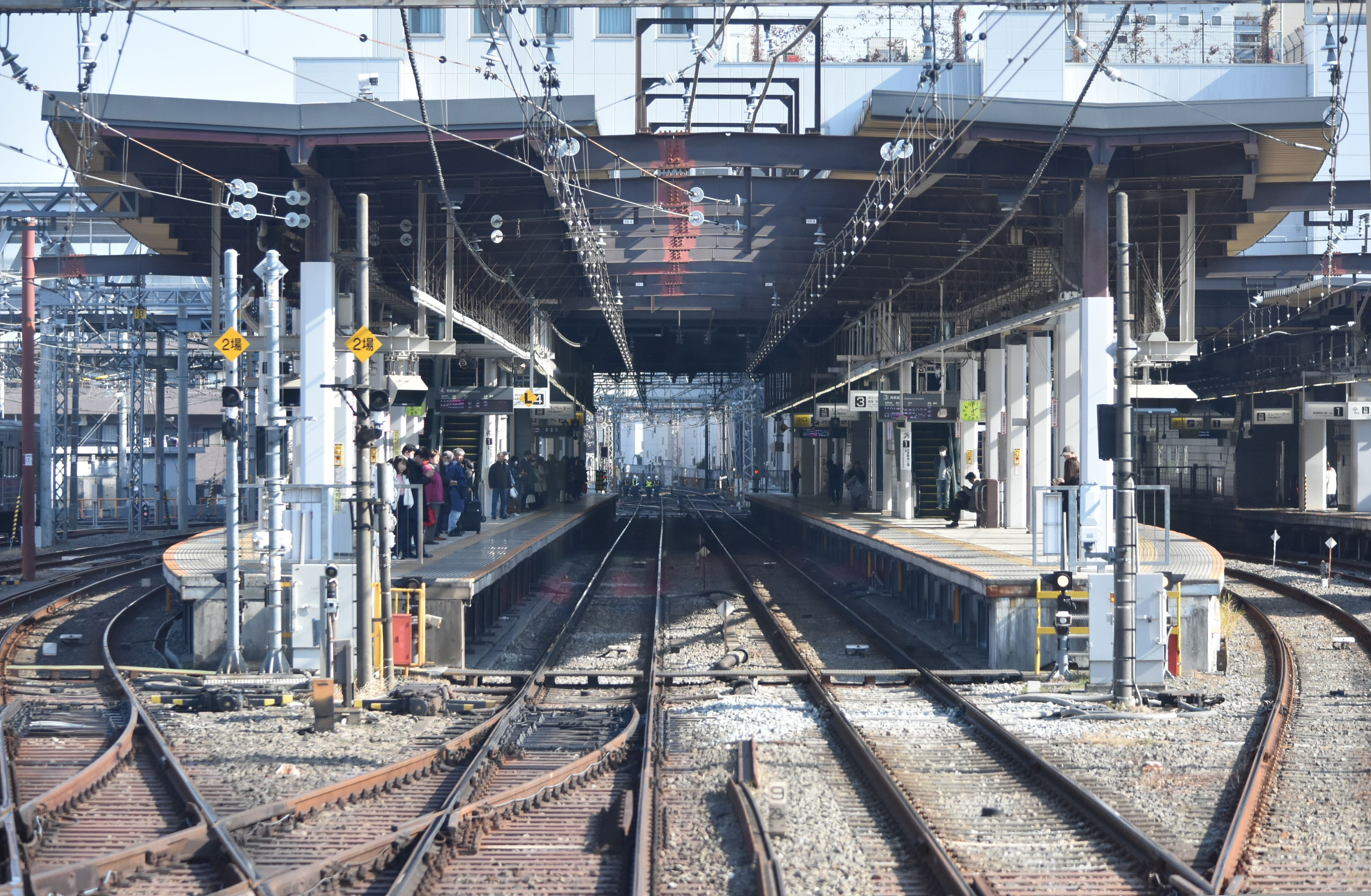 京王線 高幡不動駅 Nikon D3400